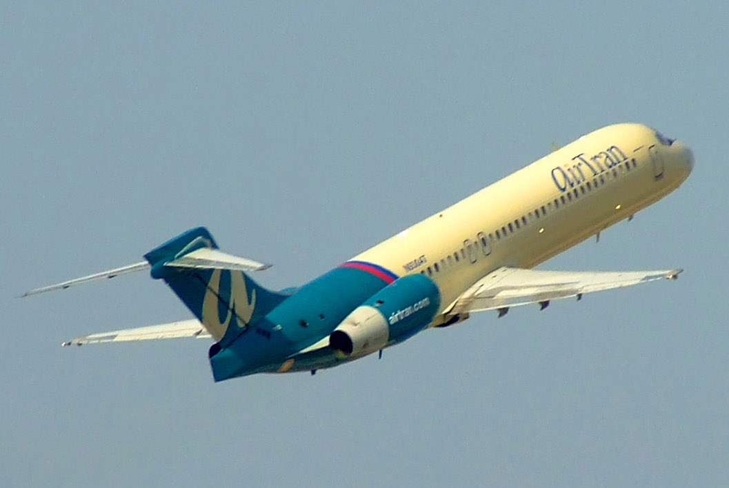 Airtran Boeing 717Airtran 717